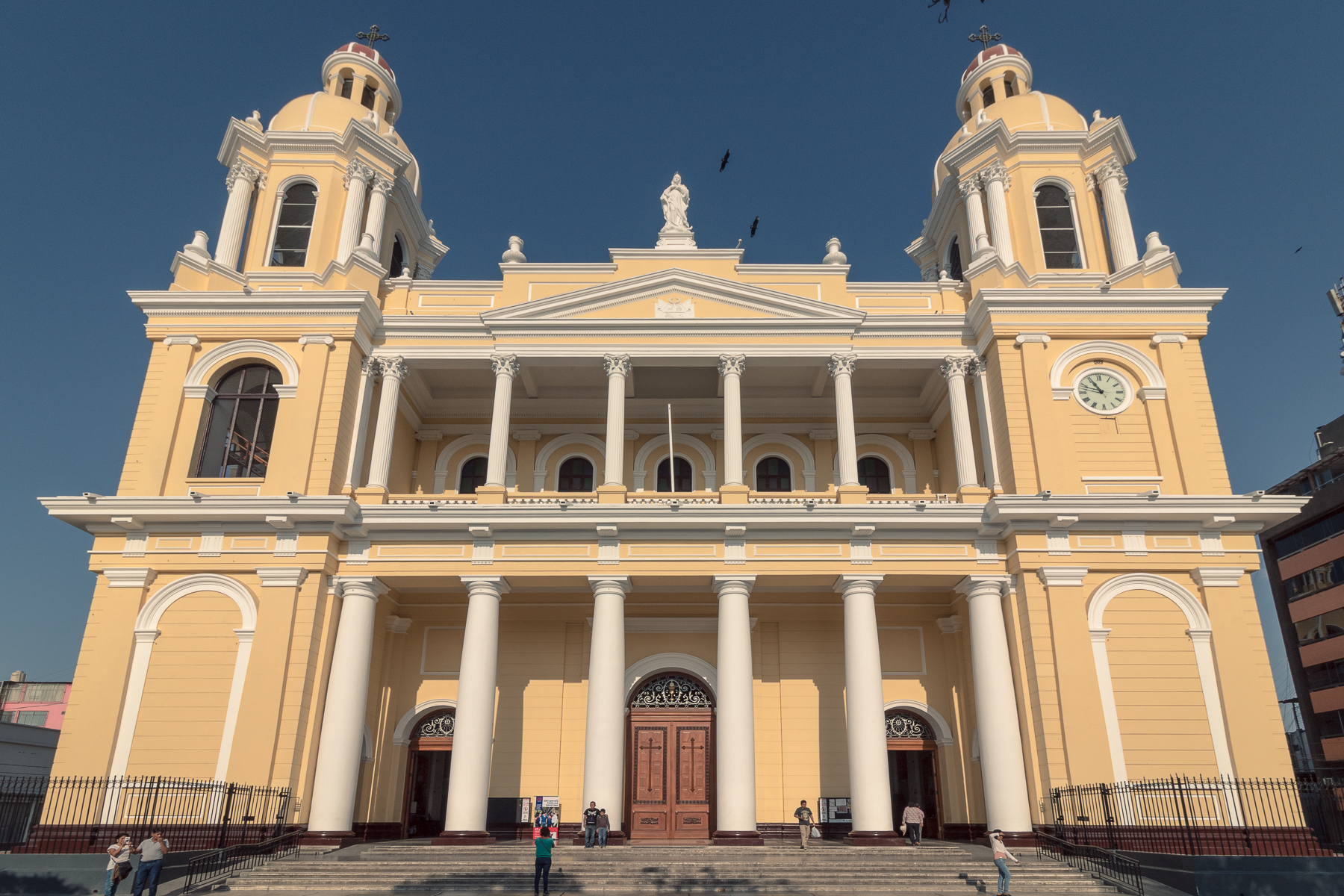 Ubicada en el parque principal de Chiclayo, su construcción es de estilo neo clásico y data de 1869 según diseño y planos de Gustavo Eiffel.